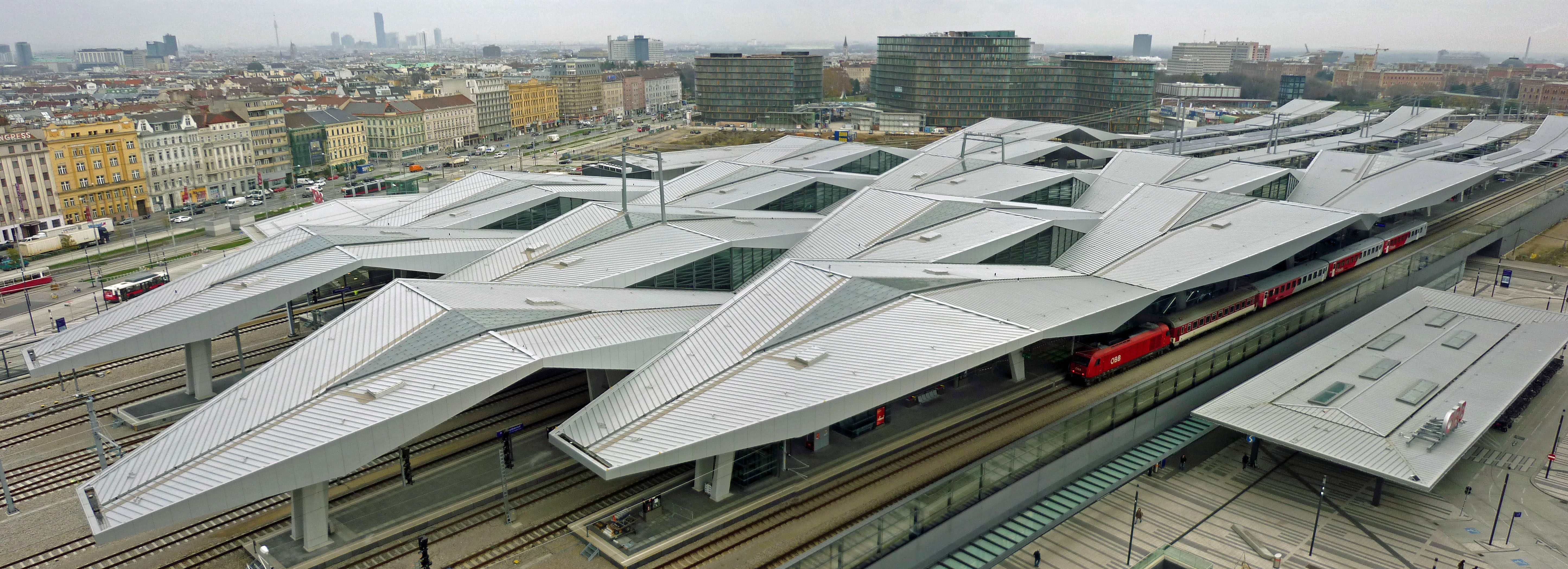 Blick vom Bahnorama-Turm auf den neuen Hauptbahnhof von Wien